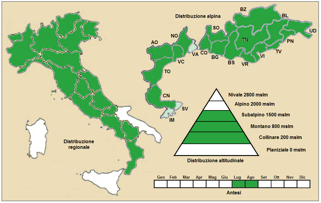 ACONITUM LYCOCTONUM neapolitanum - Distribuzione